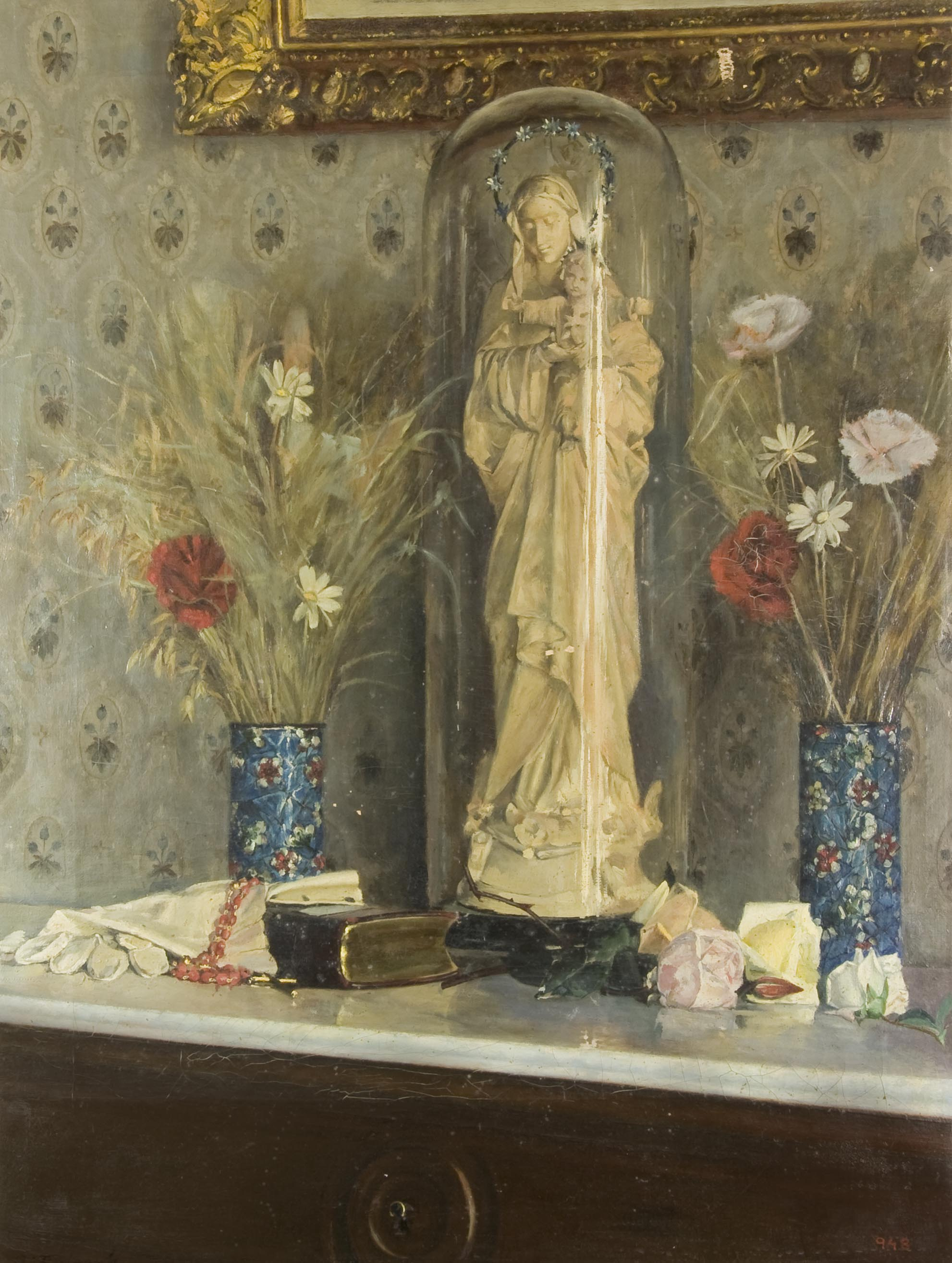 Pintura del detall d'una llar que mostra una mena d'altar domèstic o consola devocional. Representa una marededéu de marbre o ceràmica ficada en una urna de vida i, a cada banda, gerros amb flors. Sobre el marbre del moble, i donant un caire anecdòtic a la representació, hi ha uns guants de ras i una bossa de mà.